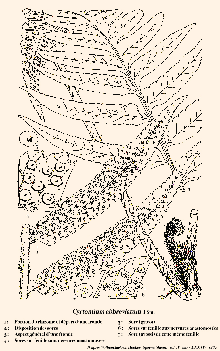 Cyrtomium abbreviatum - d'après William Jackson Hooker - Species filicum - 1862